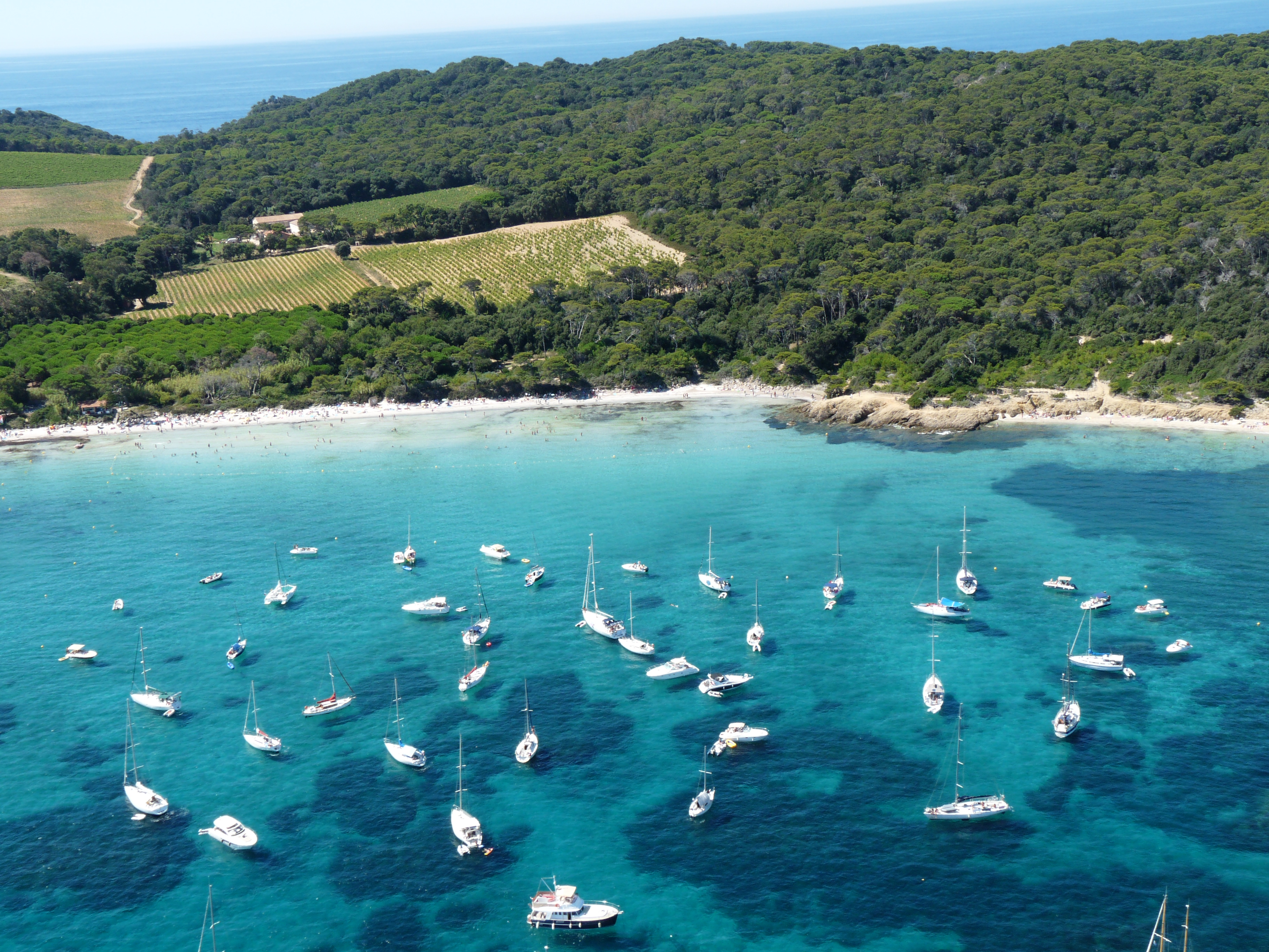 Parc national des îles de Porquerolles et de Port-Cros Île de Porquerolles Anse de la Courtade